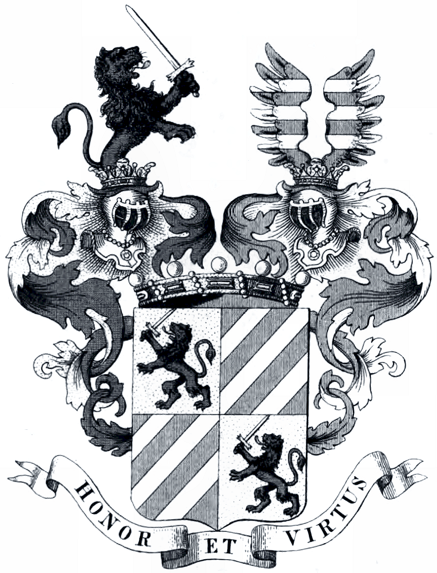 Wappen der Freiherren von Jetzer 1815, sodann des Eugen Freiherrn von Fleschner-Jetzer und seiner Nachfahren